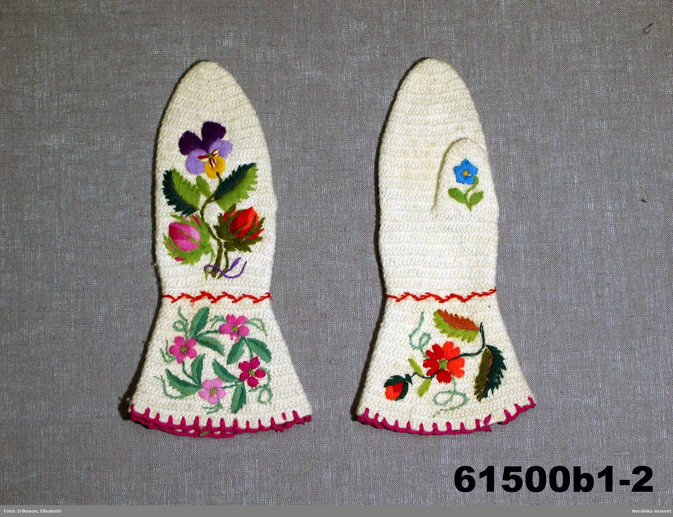 b:1 - b:2 Ett par barnvantar för flicka, av vitt ullgarn, nålbundna och sedan lätt valkade. På handryggen broderad slinga med pensé och rosenknoppar med ullgarn s.k Sefigarn i starka anilinfärger sytt i plattsöm och stjälksöm, på tummen en ensam blå blomma, och på kragen blomkrans i rosalila och grönt. Kring handleden en söm med brunorange garn och i kragens kant virkad udd av rödlila garn Kallas lokalt för Dalbyvantar och användes av både män och kvinnor. Sömmades i en variant av nålbindning som användes i Klarälvsdalen. Se vidare historik i boken Vinterblomster av Elisabeth Jacks Svantesson, Algusta förlag 2012. Såldes även av Hemslöjden i Karlstad och köptes ofta som souvenirer. /Berit Eldvik 2013-03-08